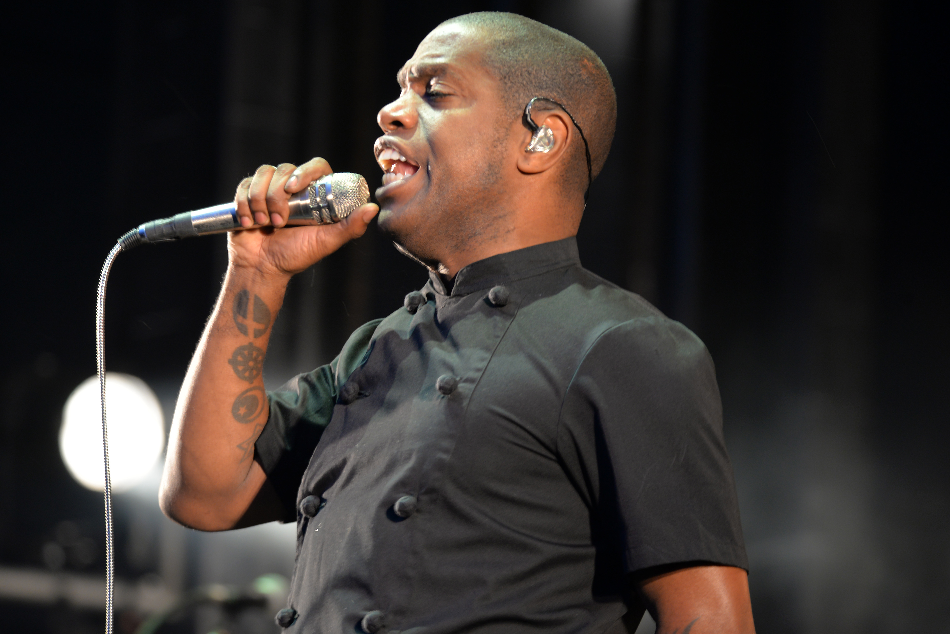 Concert du groupe Vintage Trouble au festival Papillons de nuit 2019 à Saint-Laurent de Cuves, Manche, Normandie.